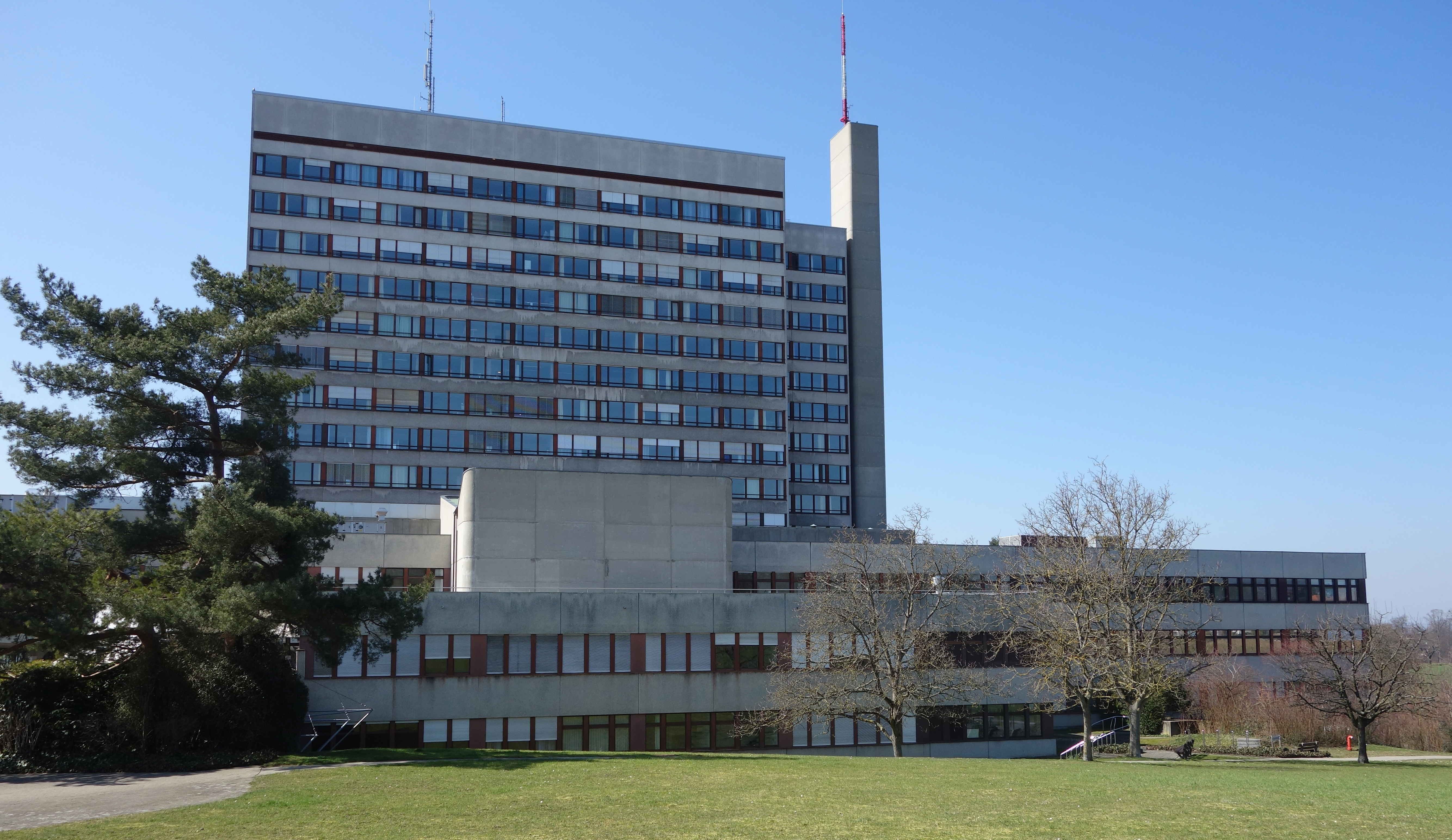 Kantonsspital Baselland Standort Bruderholz